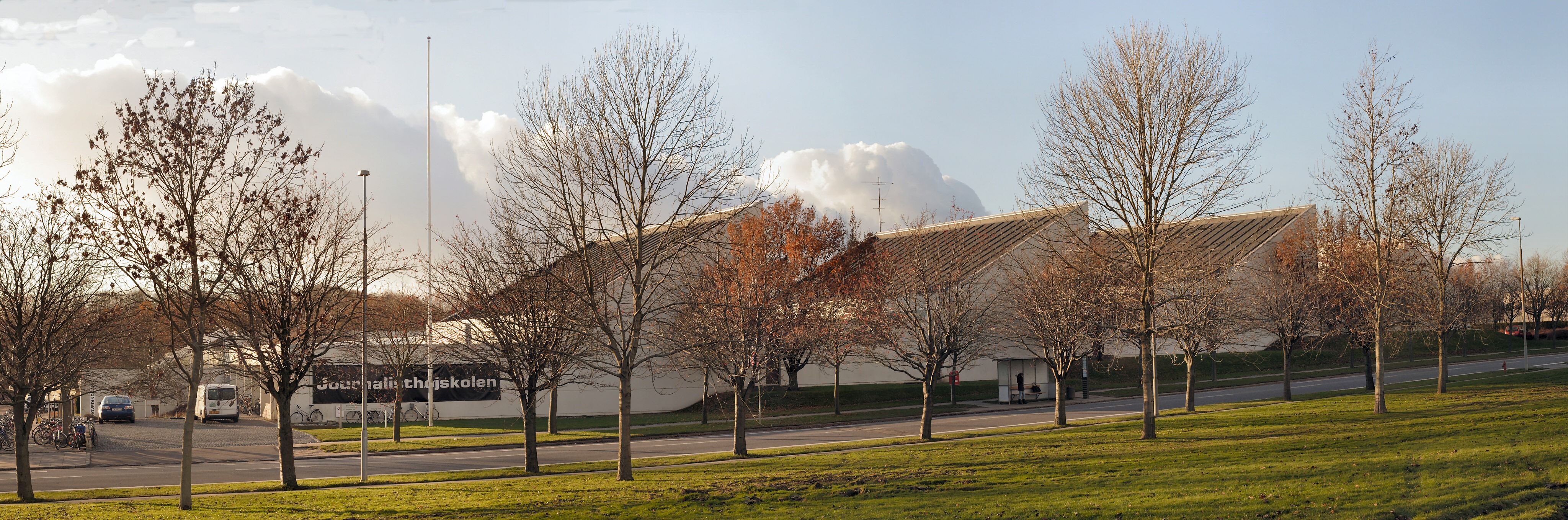 Danmarks Journalisthøjskolen i Århus